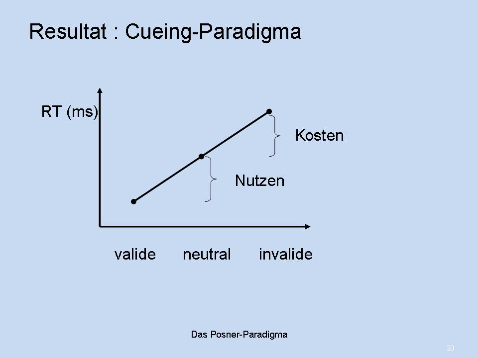 Resultat Spatial-Cueing-Paradigma